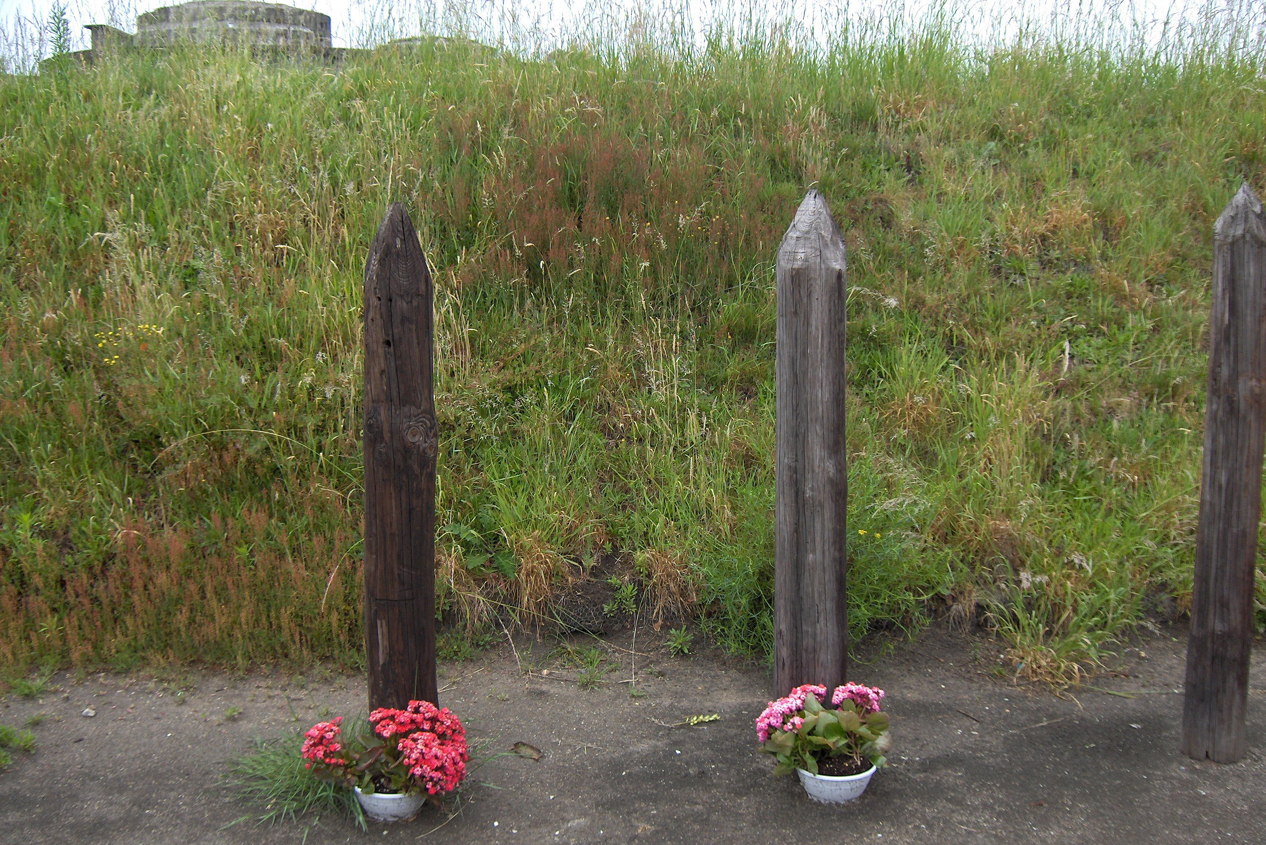 Execution pole; Fort van Breendonk, Belgium